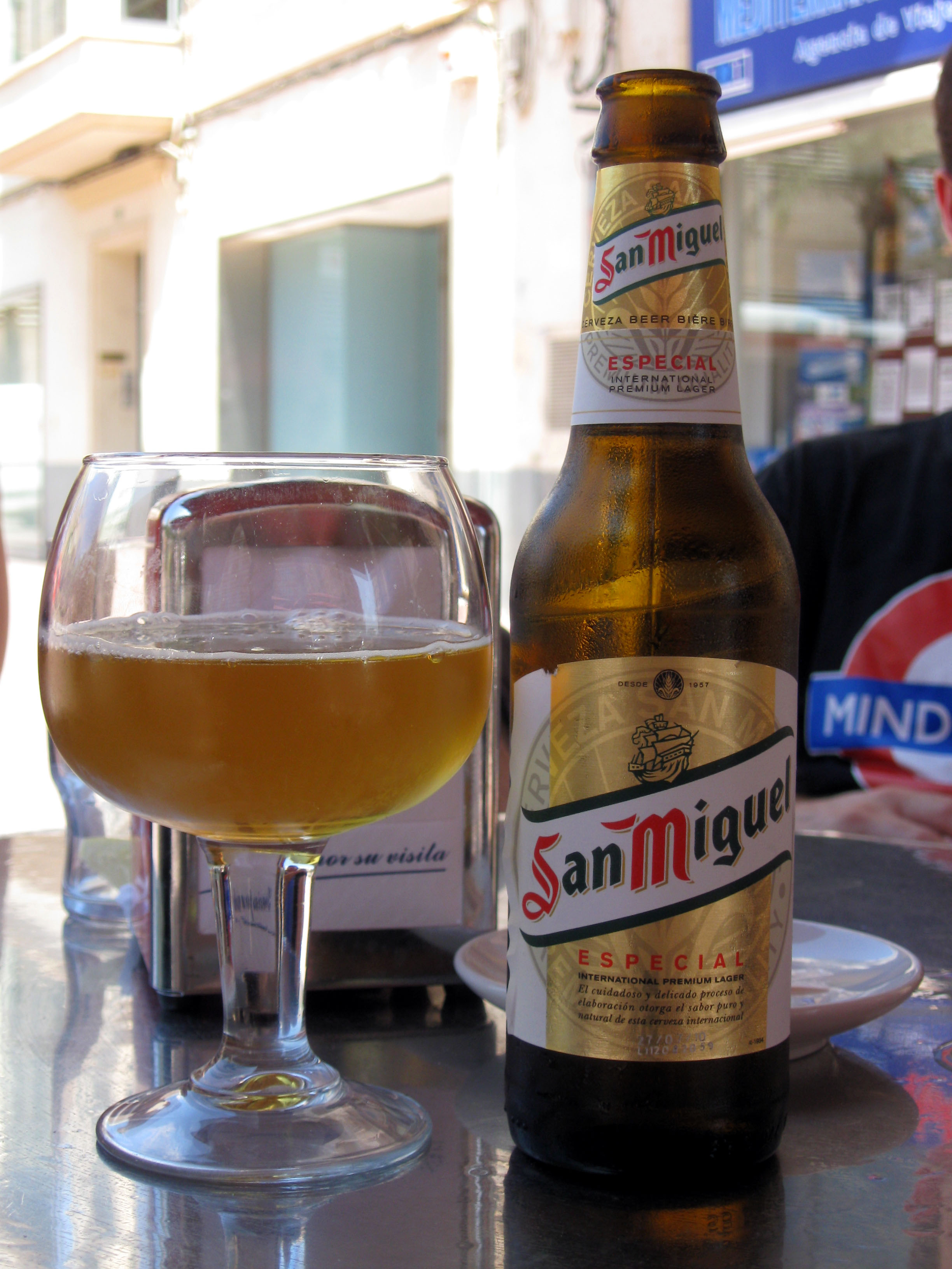 Una botella de cerveza San Miguel, en Barcelona.